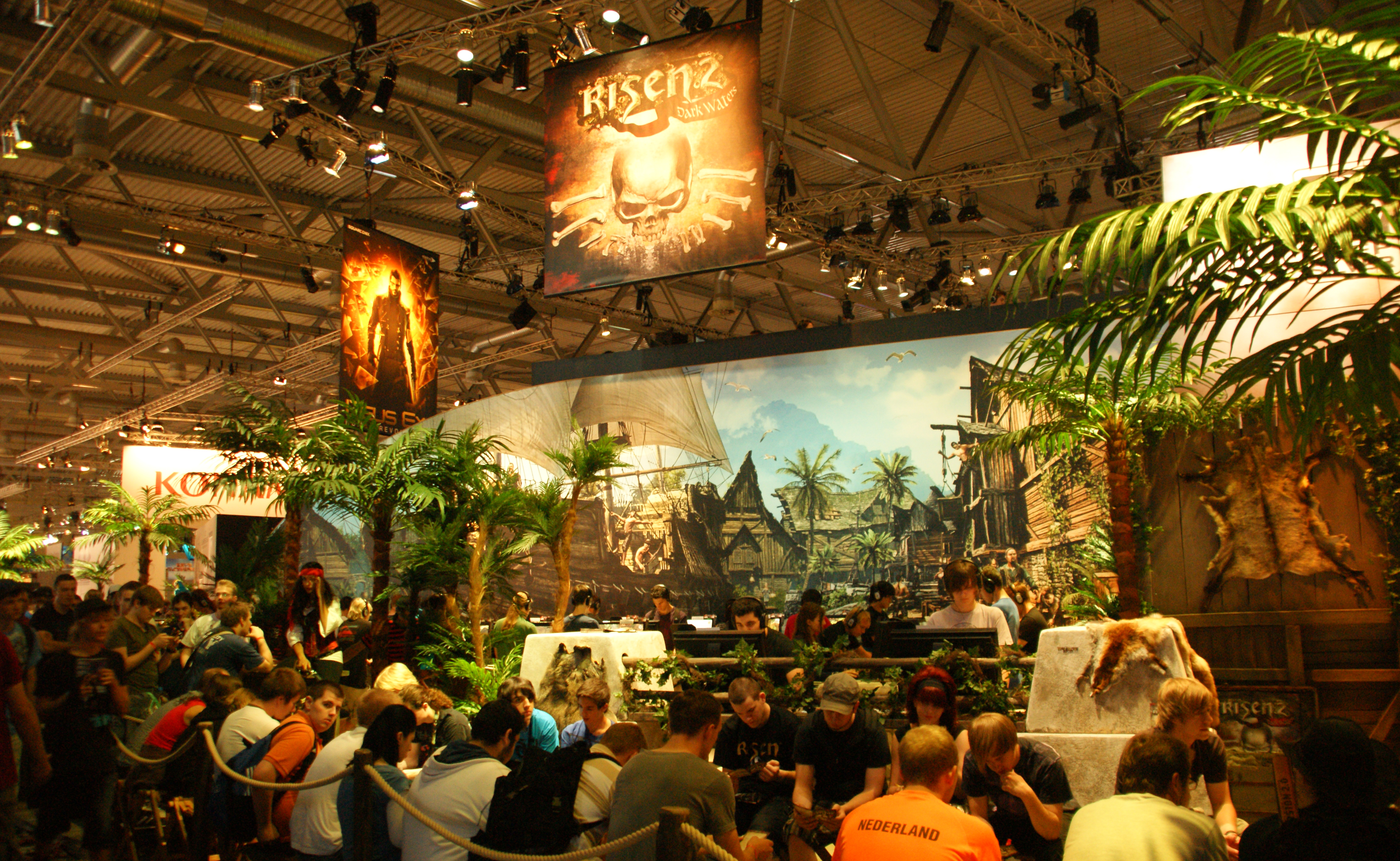 GamesCom'11